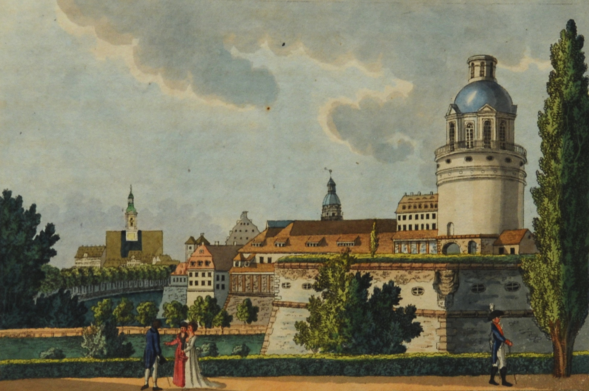 Leipzig 1804 Die Sternwarte Aquarellierter Kupferstich 15,5 x 21 cm (Plattenrand) aus: Schwarz, Karl Benjamin: Romantische Gemählde von Leipzig. Eine Folge von vier und zwanzig Prospecten gezeichnet und gestochen von Karl Benjamin Schwarz. Leipzig: Karl Tauchnitz 1804, 56 S. + 23 aquarellierte Kupfertafeln + 1 nicht kolorierter Stich. Carl Benjamin Schwarz: Vedutenstecher, Zeichner, Radierer, Farbstecher und Aquarellist (*1757 Leipzig, † 21.10.1813 ebenda). Schüler Oesers; Kustos an der Winklerschen Kunstsammlung (THIEME-BECKER Bd. 30, S. 365).